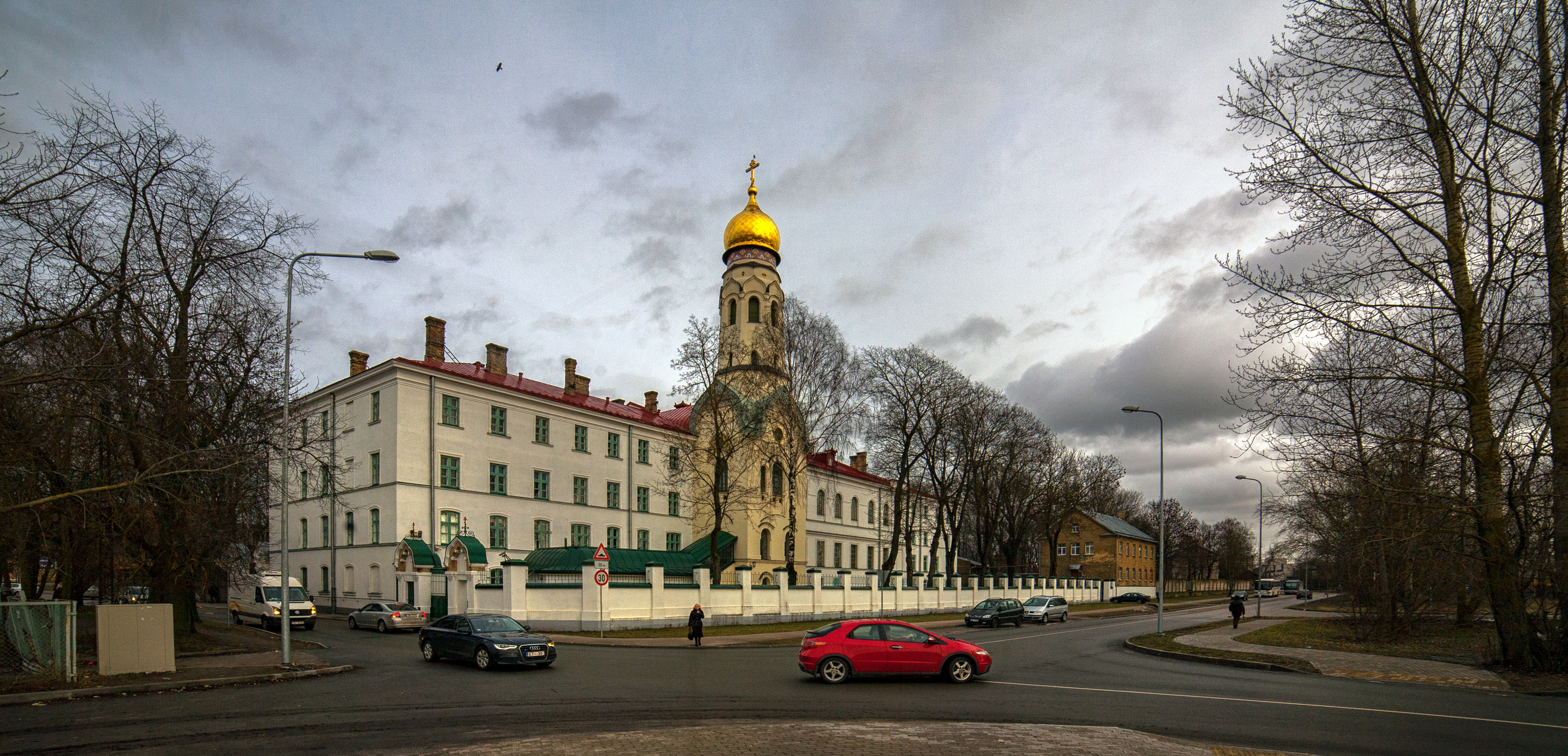 Grebenščikova vecticībnieku kopienas lūgšanu nama ar klosteri apbūve, Rīga, Krasta iela 73